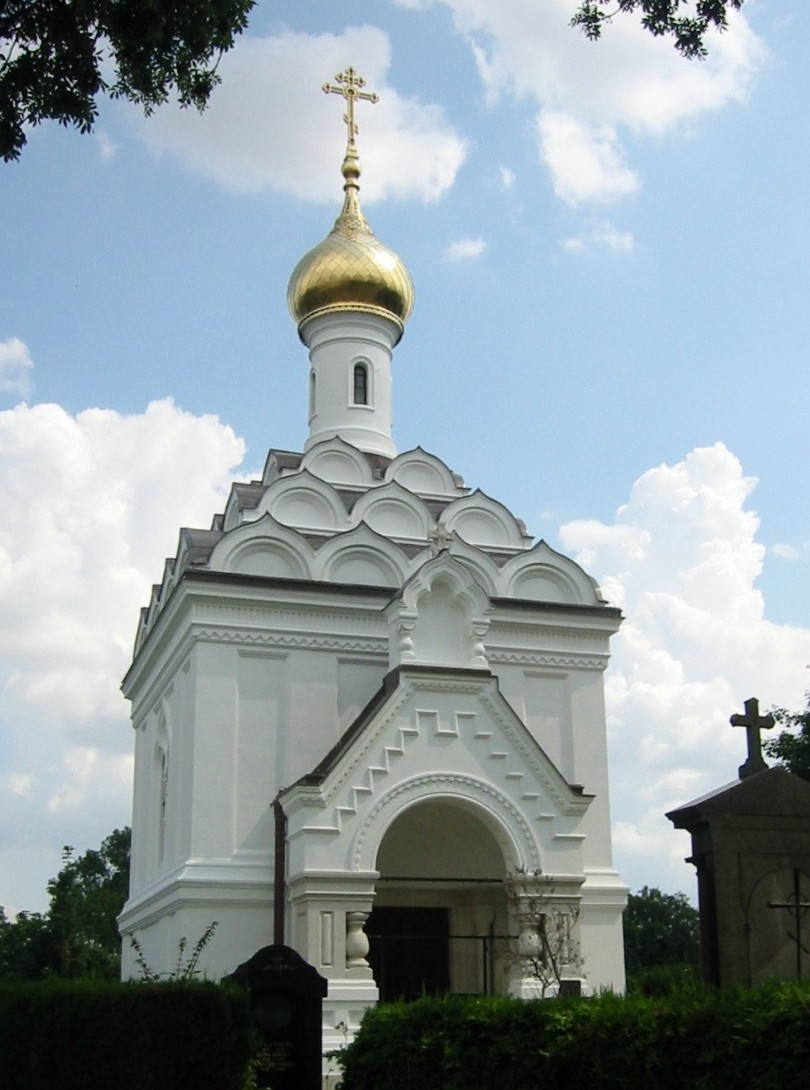 Zentralfriedhof Russisch-orthodoxe Kirche